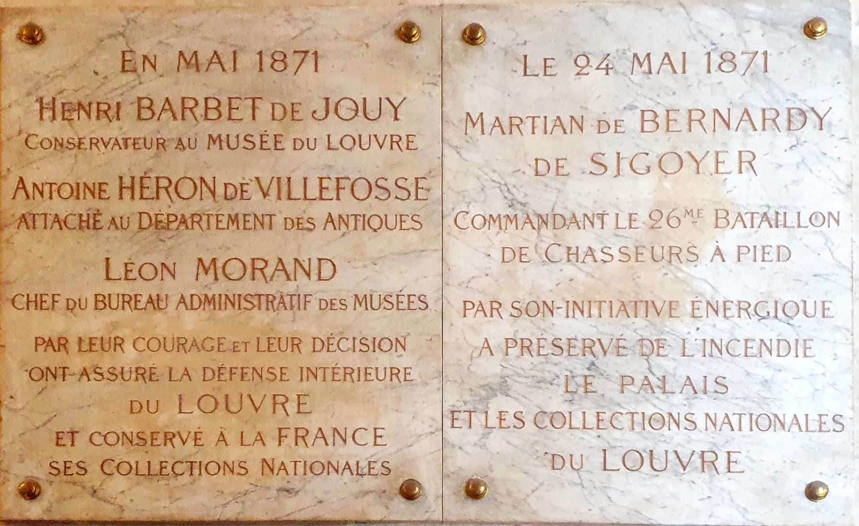 Plaque commémorative en l'honneur des personnes qui ont sauvé les collections du Louvre des incendies allumés par les communards. Cette plaque est située dans le vestibule Denon au rez-de-chaussée du musée du Louvre.